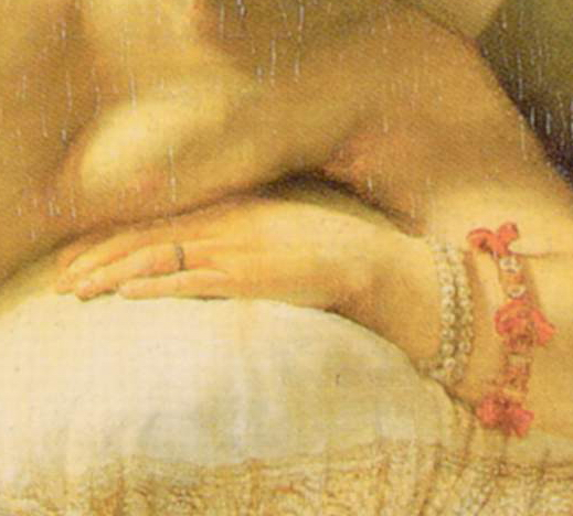 detail 2